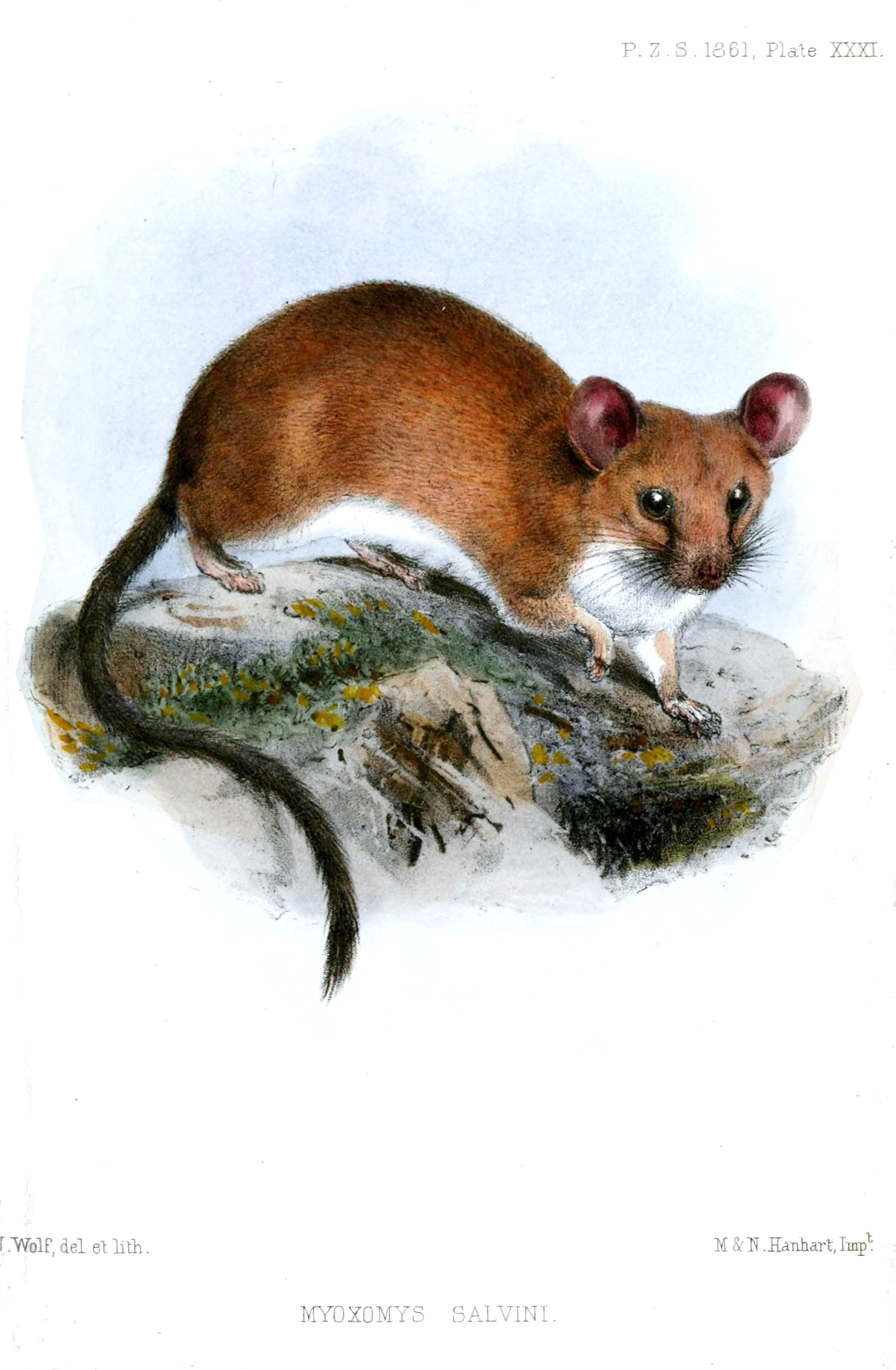 Myoxomys salvini, Synonym to Nyctomys sumichrasti